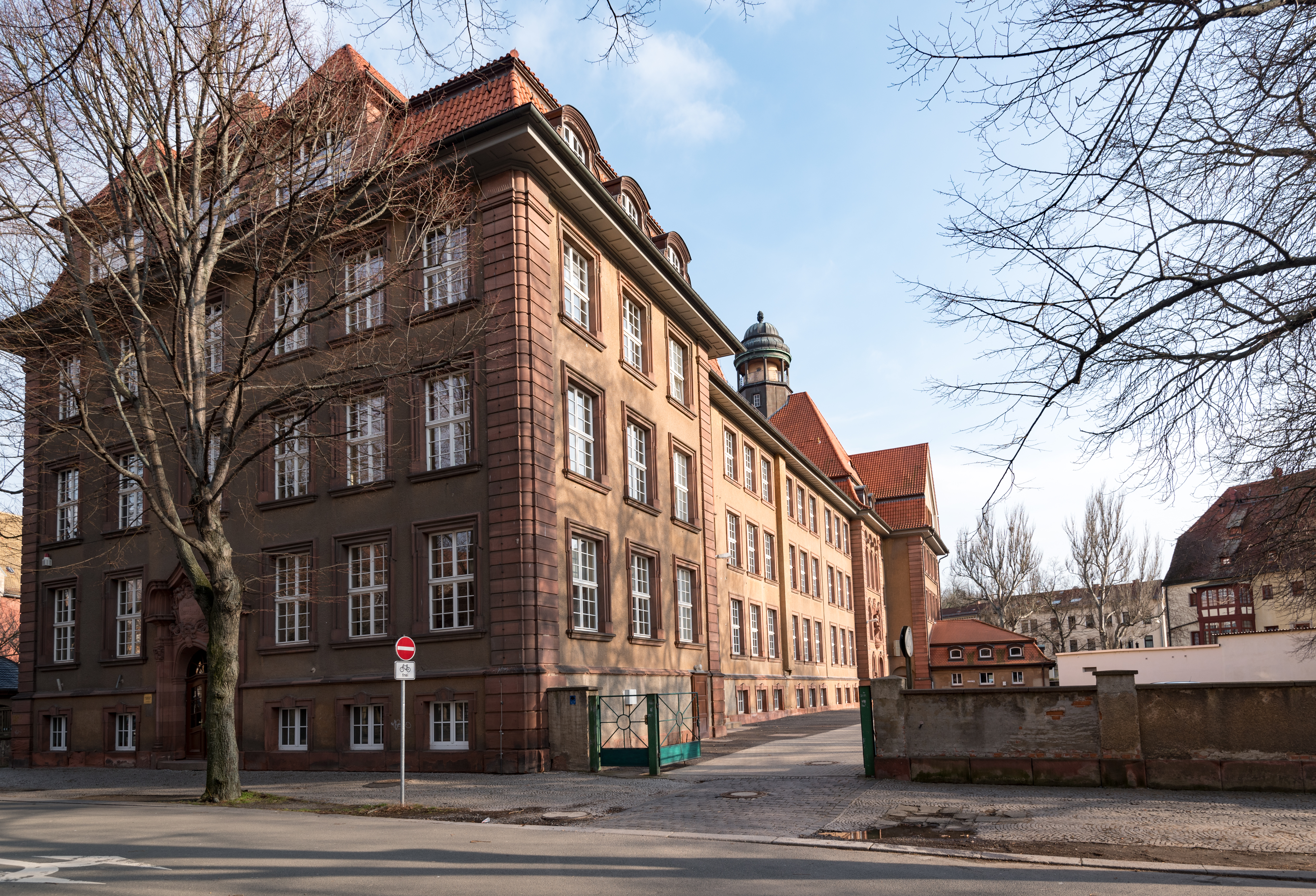 Weißenfels, Am Kloster 4